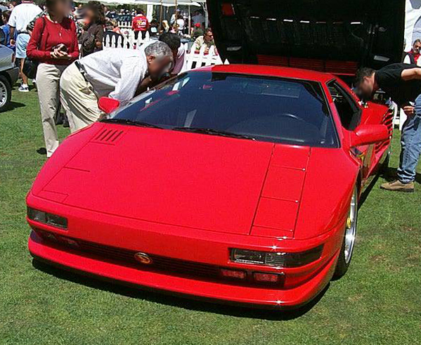 Cizeta V16